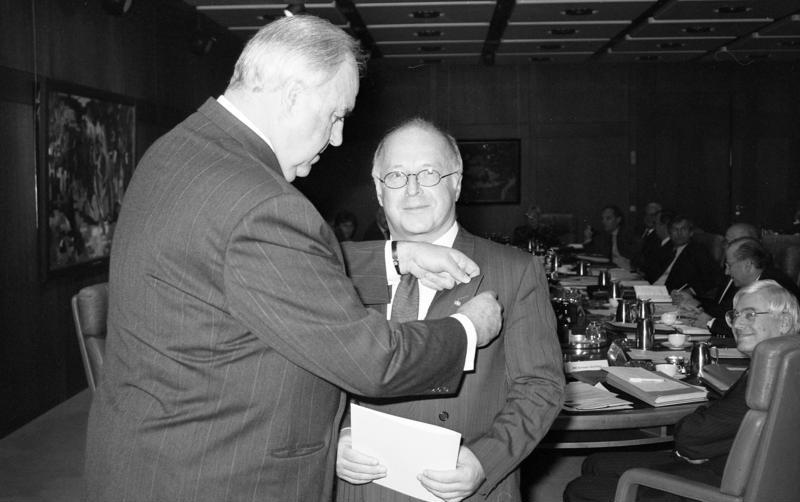 12.9.1990 Bundeskanzler Helmut Kohl überreicht Bundesminister für Arbeit, Dr. Norbert Blüm, Bundesminister für Umwelt, Prof. Dr. Klaus Töpfer und Bundesminister für Bildung und Wissenschaft, Jürgen W. Möllemann das Große Verdienstkreuz des Verdienstordens der Bundesrepublik Deutschland - am Rande der Kabinettsitzung im Bundeskanzleramt